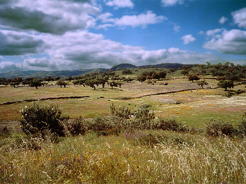 Sierra de Aracena y Picos de Aroche, Huelva (Spain).